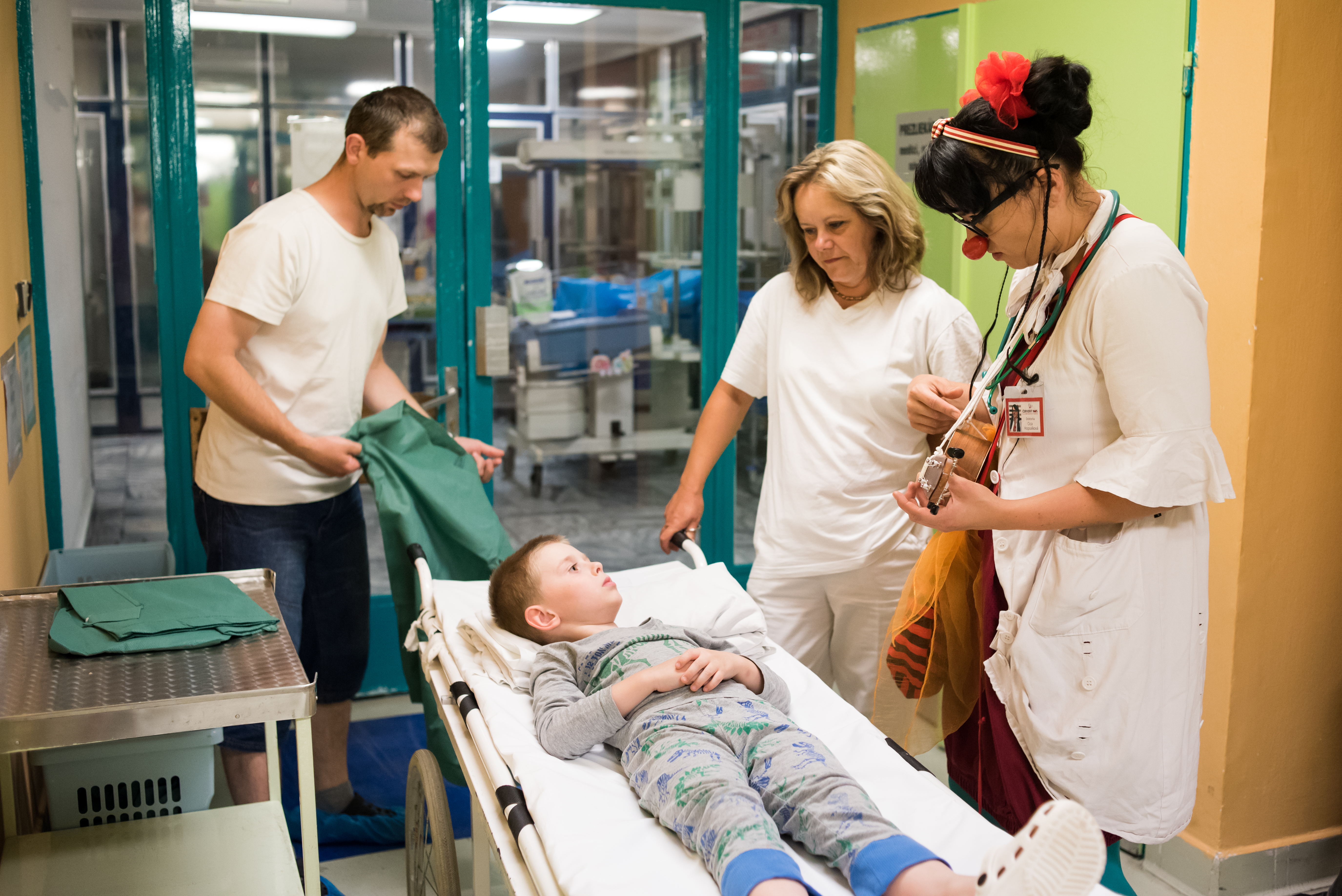 Zdravotná klaunka z o.z. ČERVENÝ NOS Clowndoctors odprevádza na operáciu malého pacienta.